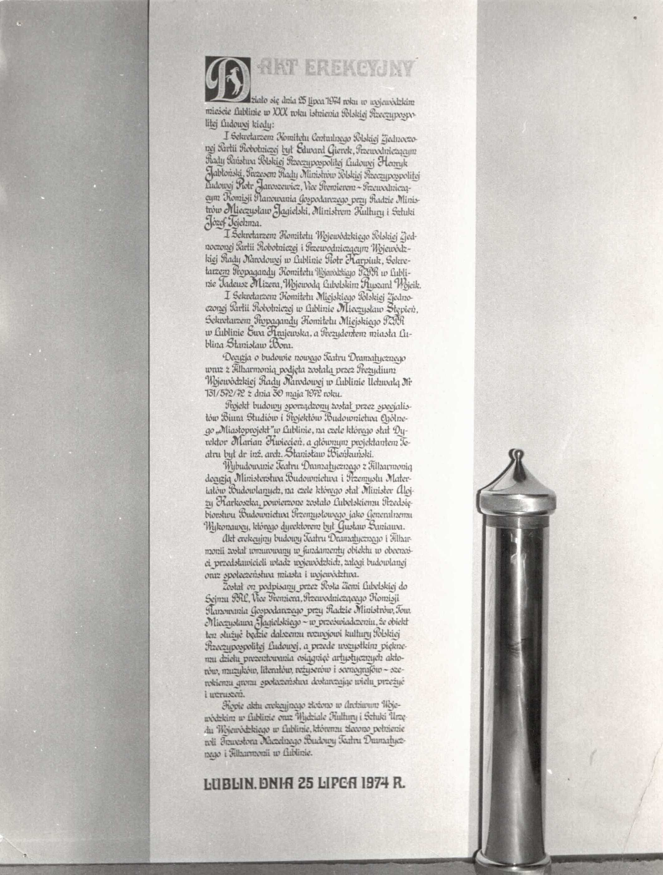 Zdjęcie wmurowanego aktu erekcyjnego Teatru w Budowie